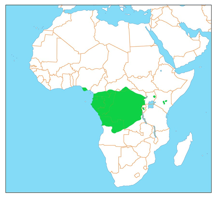 мапа поширення Cephalophus nigrifrons